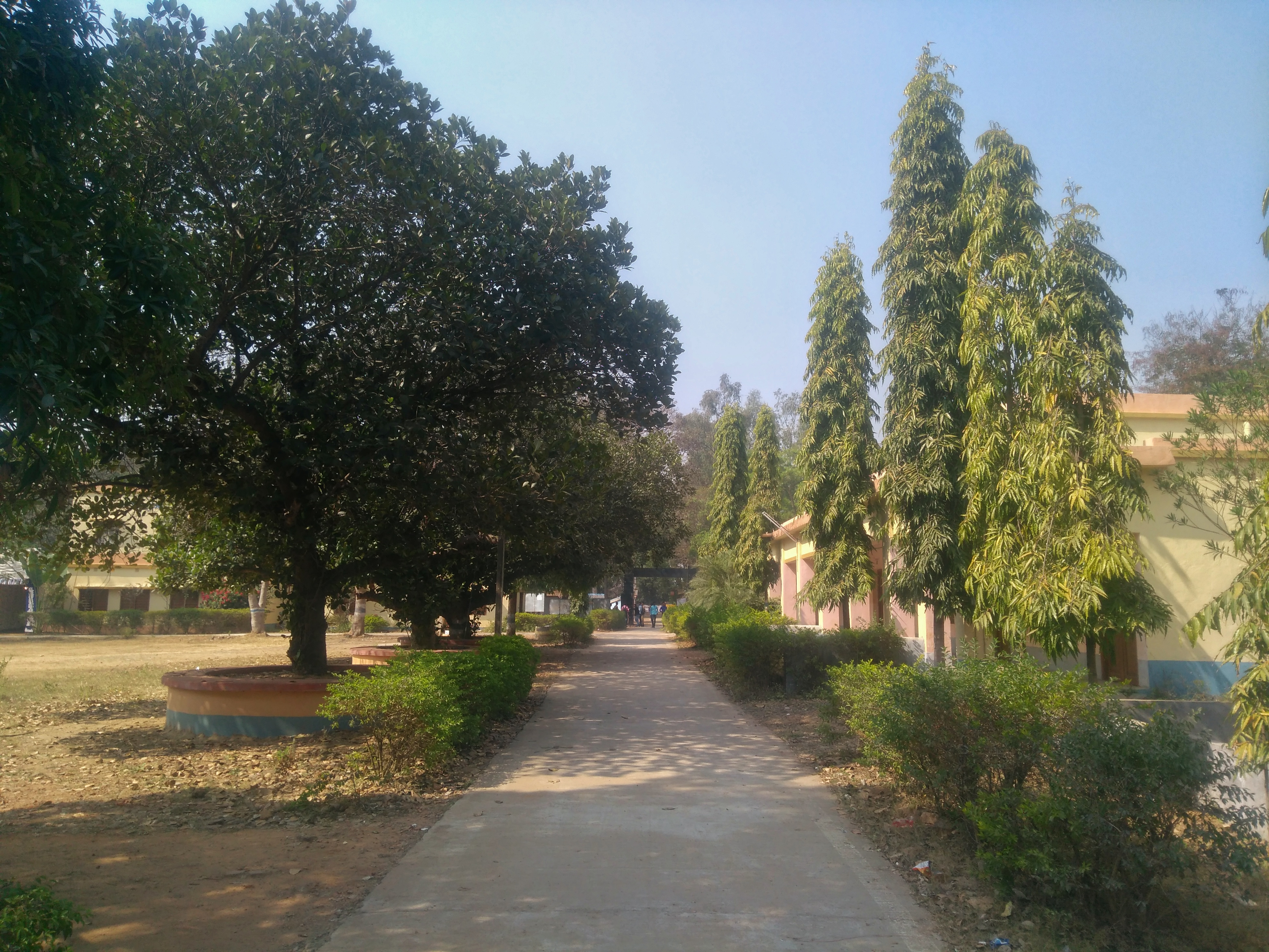 Khatra Adibasi Mahavidyalaya college campus. Location: Khatra, Bankura, West Bengal, India